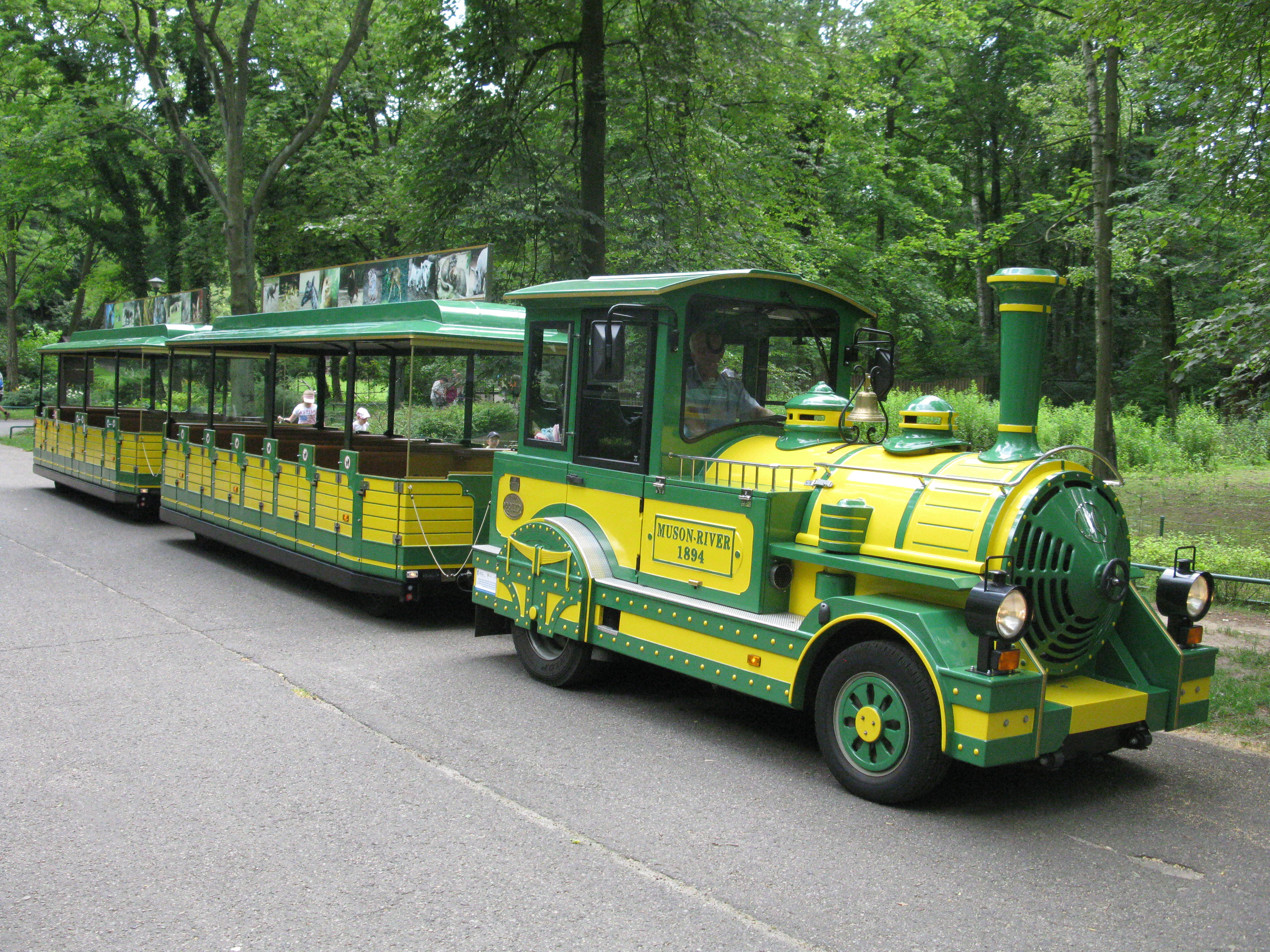 Kolejka parkowa "Zwierzynka" w Nowym Zoo w Poznaniu